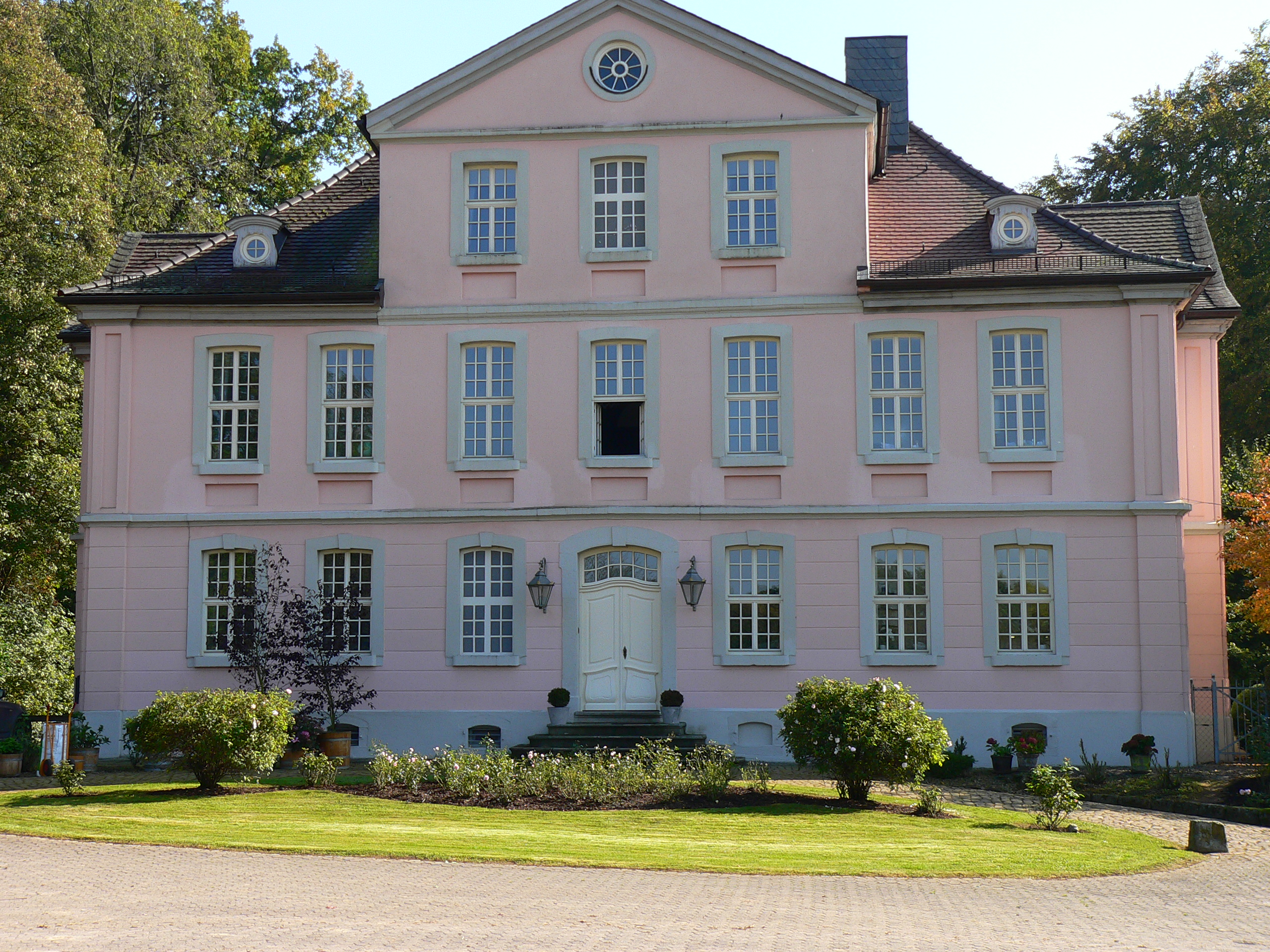 Schloss Windhausen in Niestetal- Heiligenrode im Landkreis Kassel, Hessen, Deutschland